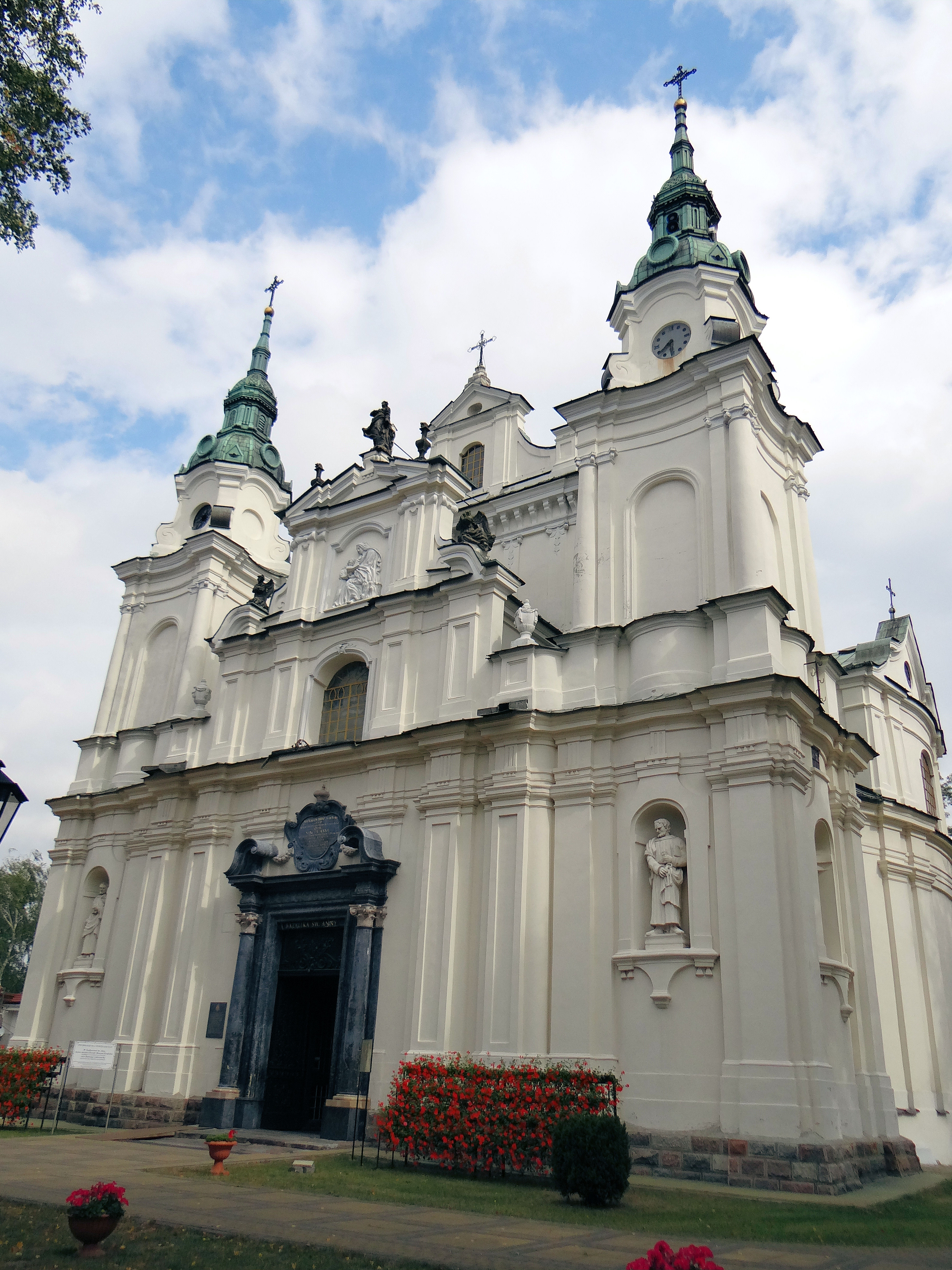 Bazylika pod wezwaniem św. Anny w Lubartowie - widok ogólny frontonu